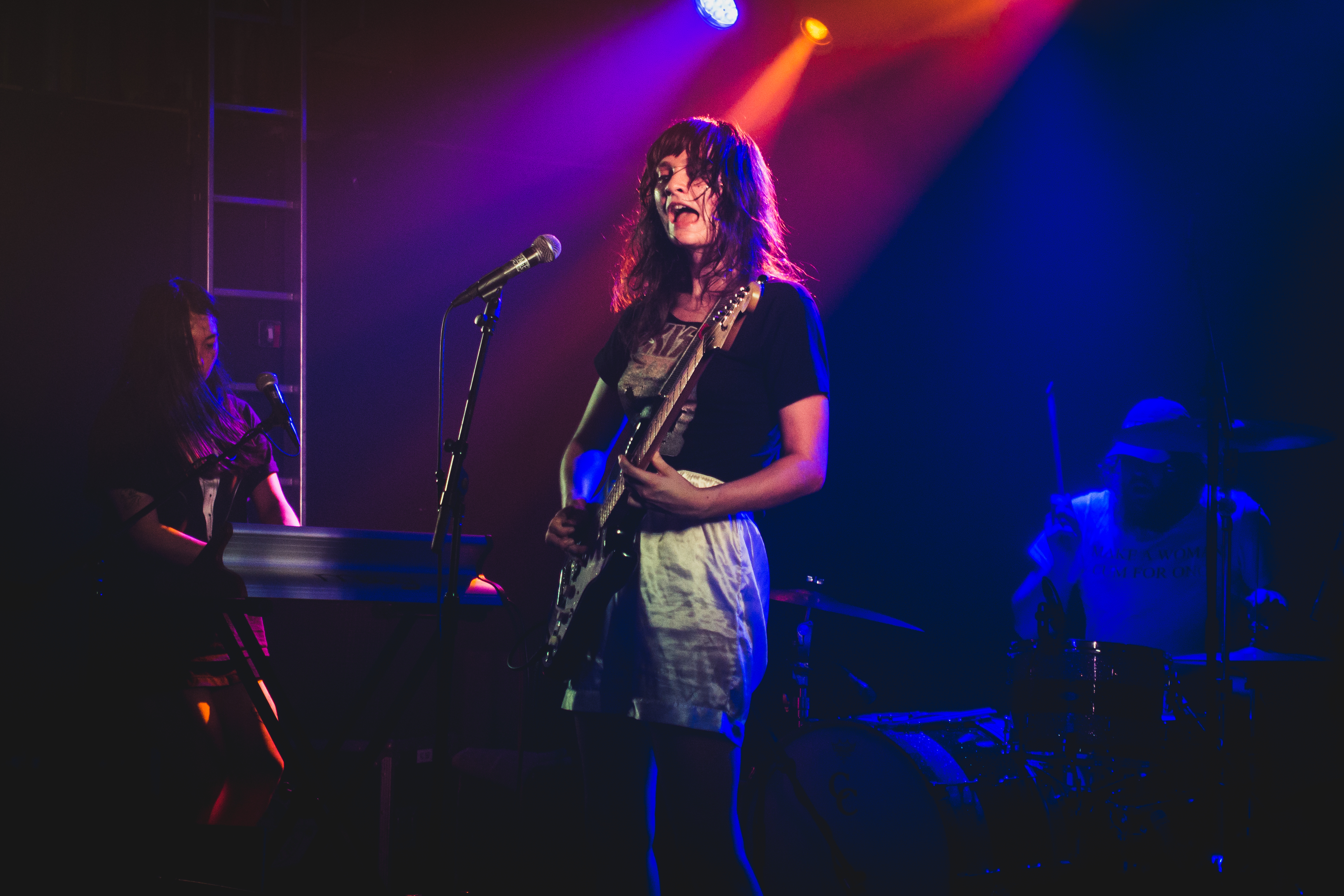 Cherry Glazerr